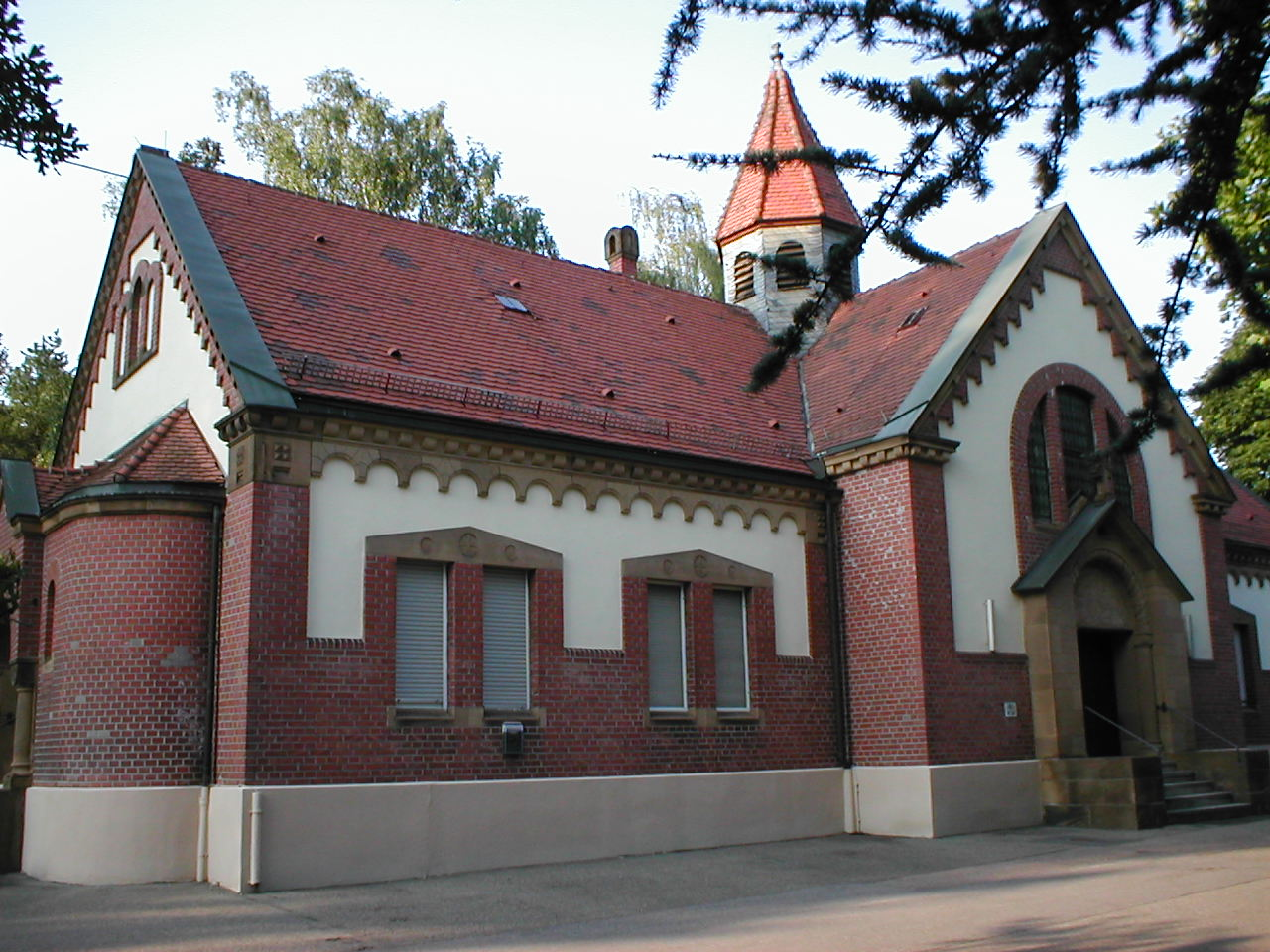 Neoromanische Friedhofskapelle in Heilbronn-Böckingen, 1905